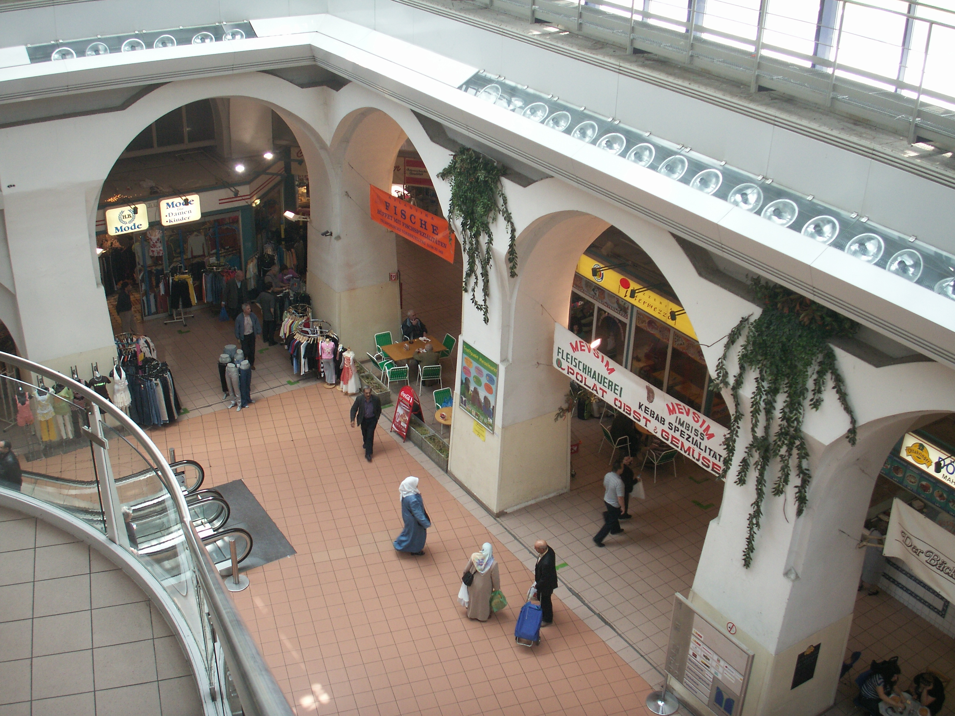 Meiselmarkt, Wien 15.